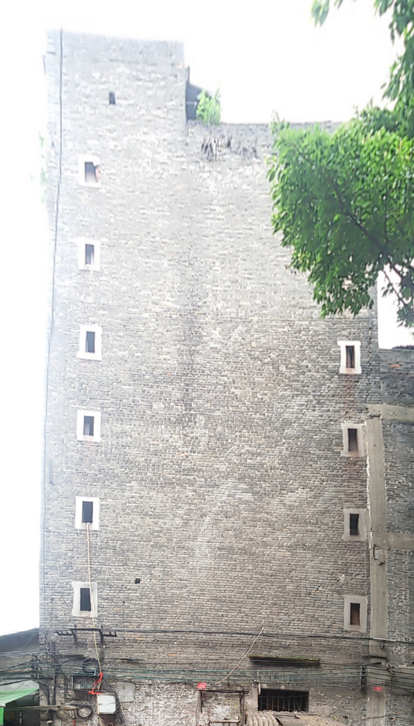 粵語: 喺荔灣區西關嗰邊嘅迪吉大押